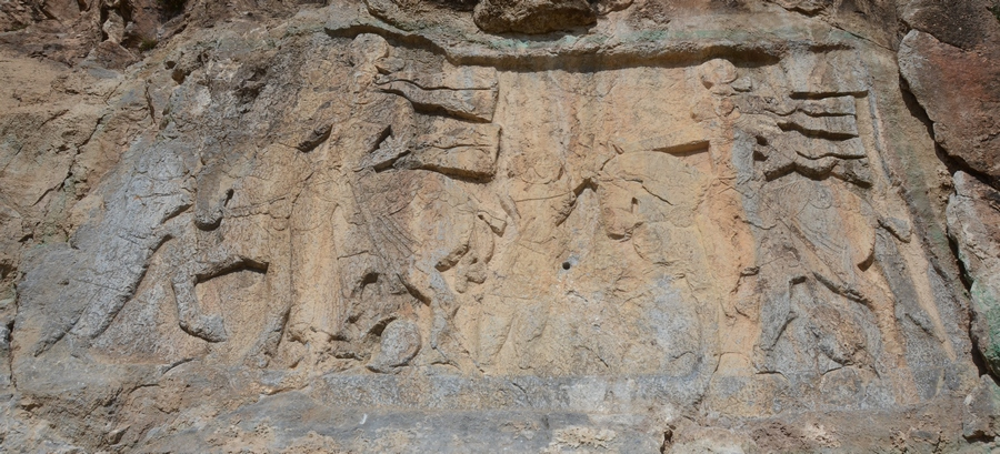 Relevo sassânida de Salmas com Artaxes I e Sapor I capturando um rei e um vizir.